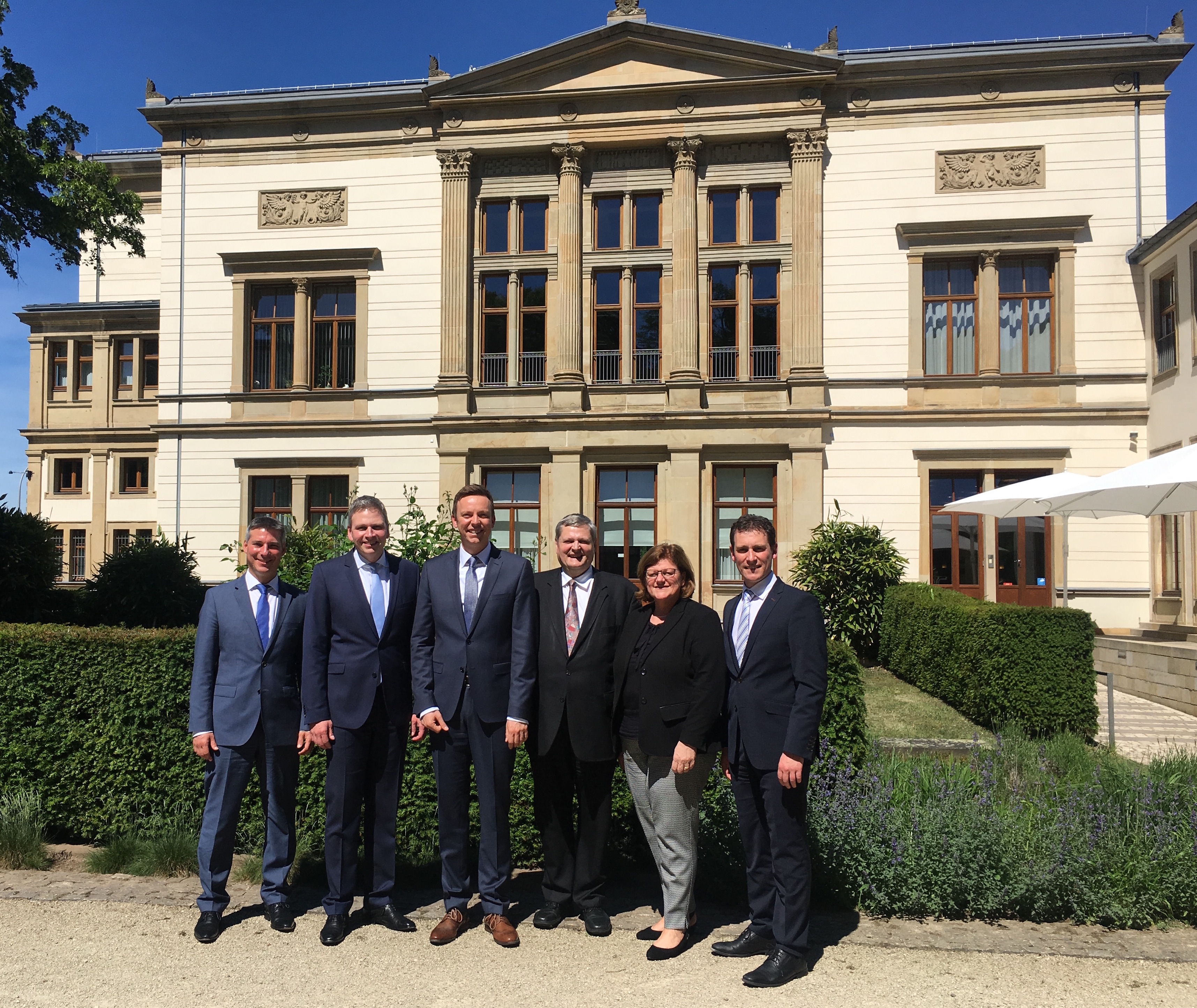 Der Vorstand der CDU-Landtagsfraktion vor dem Landtag des Saarlandes